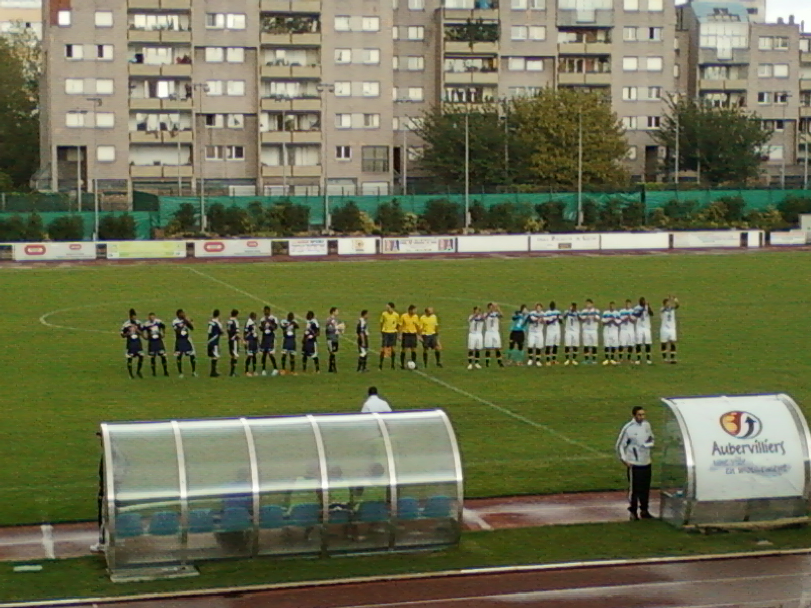 Présentation des équipes lors du match FCM Aubervilliers - Lille OSC B du 27 août 2011 au stade André Karman